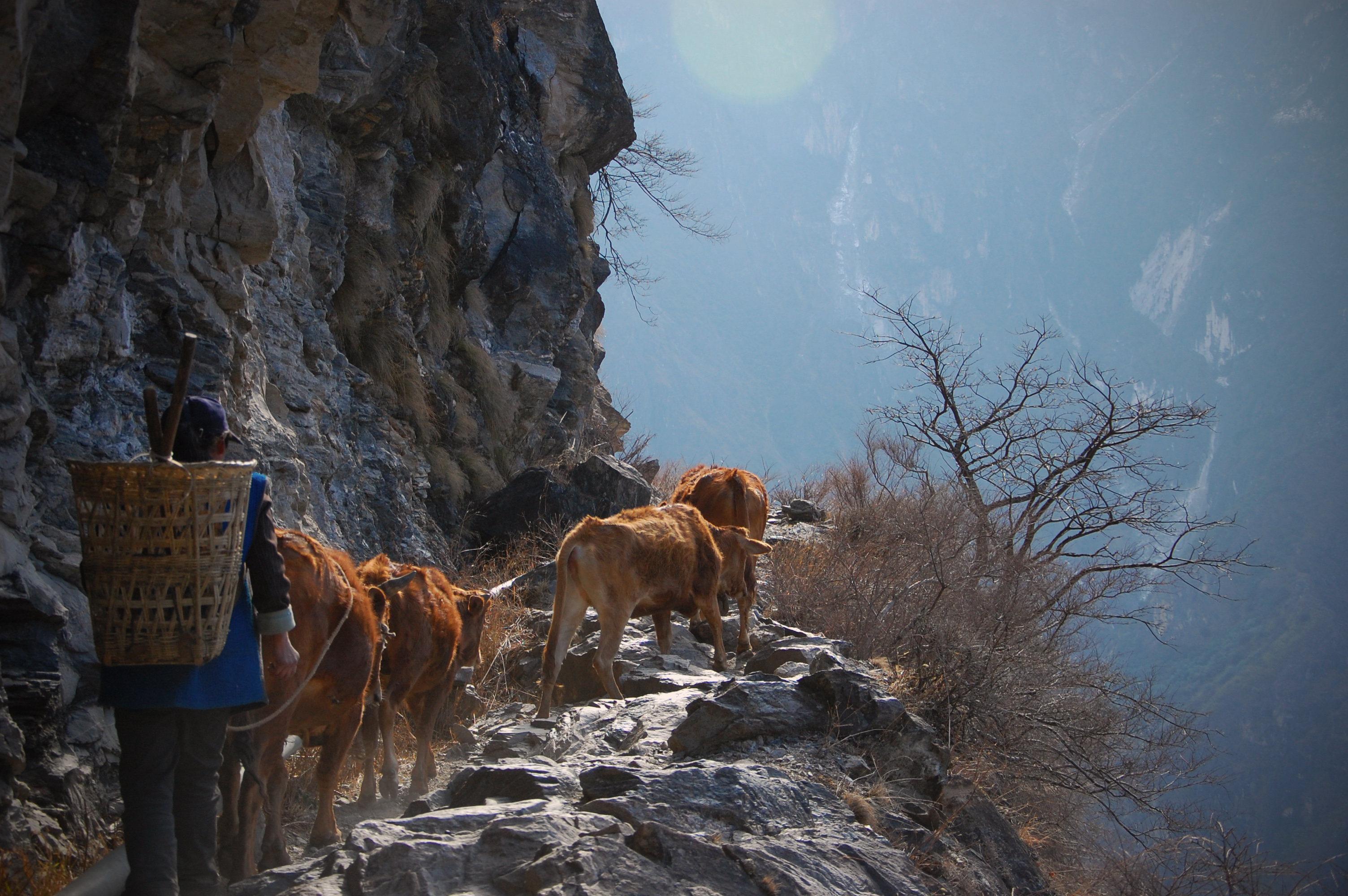 A woman walking her herd of cows, Jinsha jiang, Yunnan